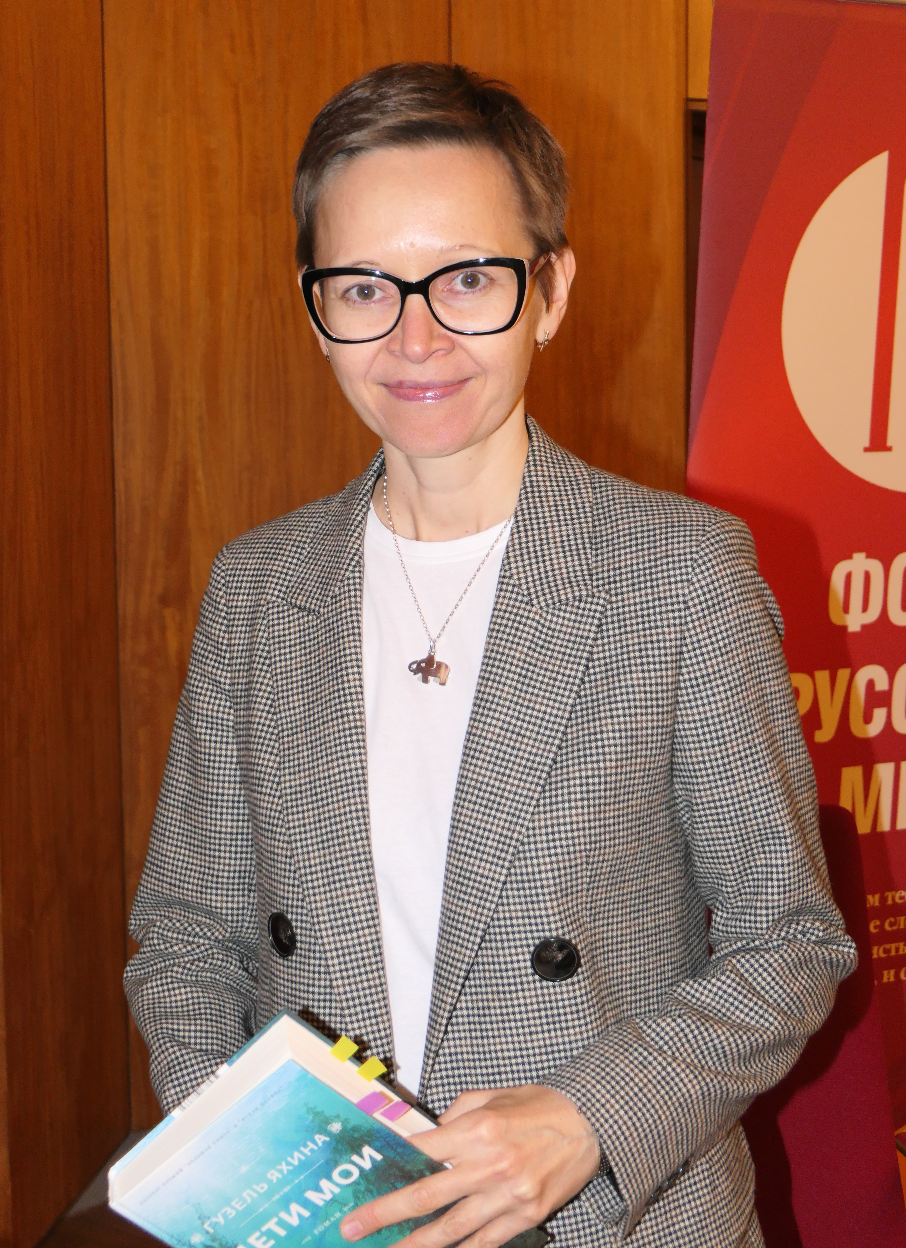 Gusel Jachina während einer Buchlesung in Dresden am 11. Januar 2020